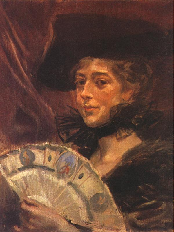 Portret córki Wojciecha Kossaka - Marii Pawlikowskiej-Jasnorzewskiej. Olej na płótnie. 52 x 43 cm.